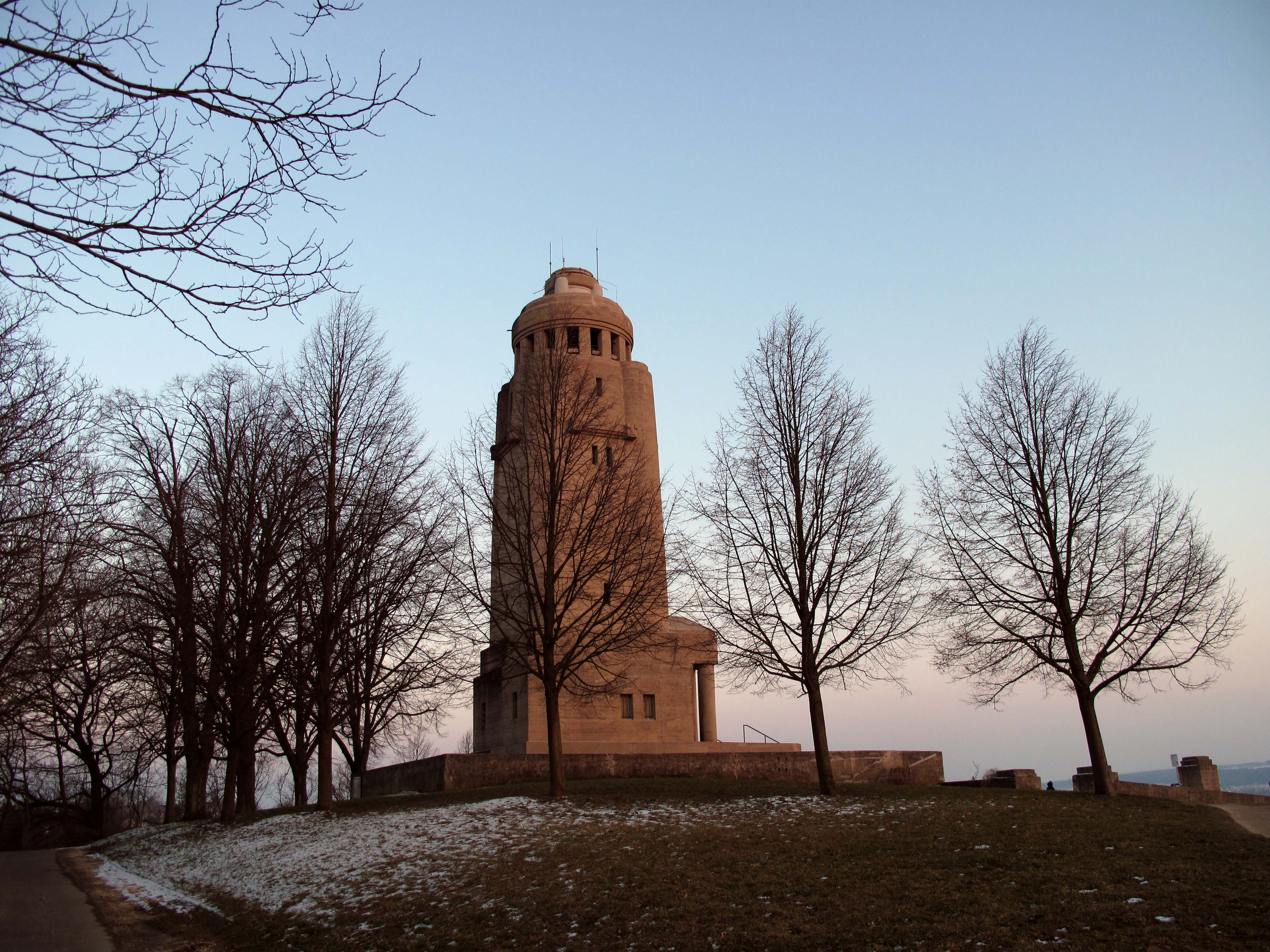 La torre en honor de Bismarck ubicada en una de las colinas de la ciudad alemana de Constanza (Konstanz)